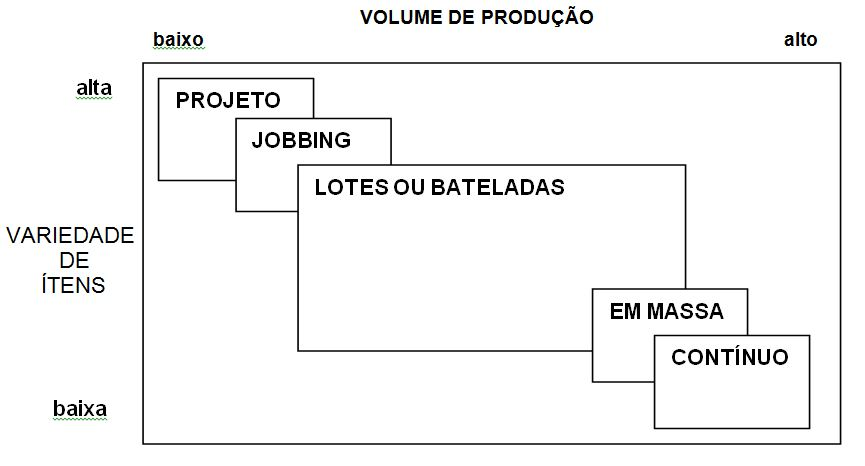 Relação entre volume e variedade considerando os tipos de produção.